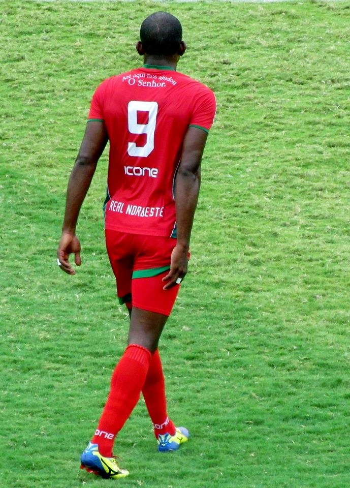 Atacante Willy na época de Real Noroeste